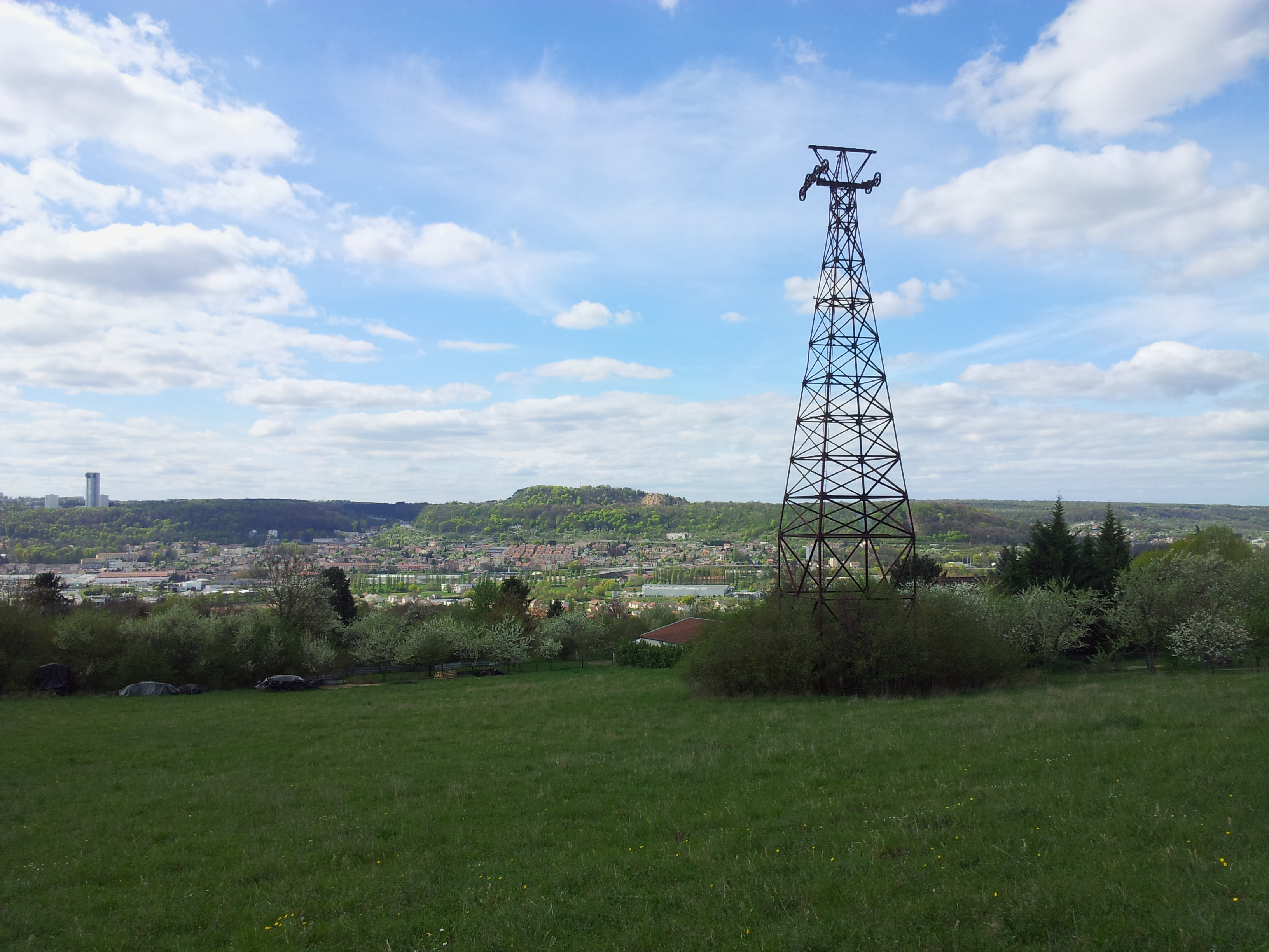 Vestige d'un pylône du TP Max à Malzéville (à droite), ancienne carrière Solvay en partie reboisée à Maxéville (arrière-plan au centre) et Tour Panoramique (arrière-plan à gauche), vu depuis le flanc ouest du plateau de Malzéville.